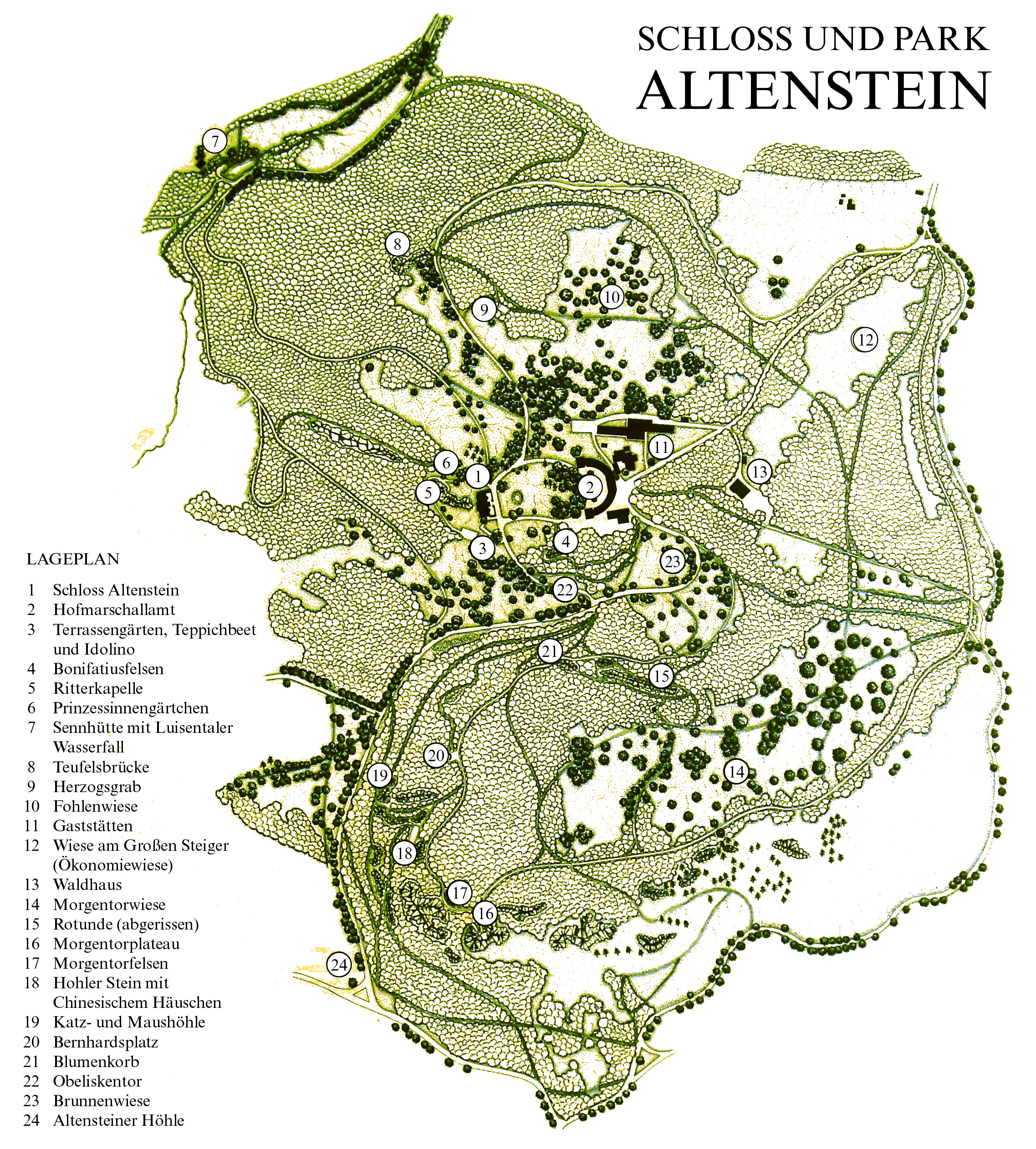 Lageplan von Schloss und Park Altenstein Überarbeitetes Foto einer Hinweistafel der Stiftung Thüringer Schlösser und Gärten am Eingang zum Rundbau (Hofmarschallamt)